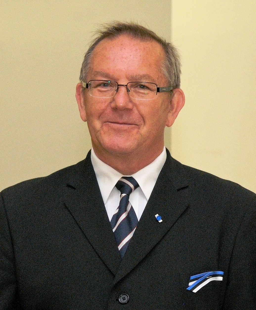 Ants Veetõusme